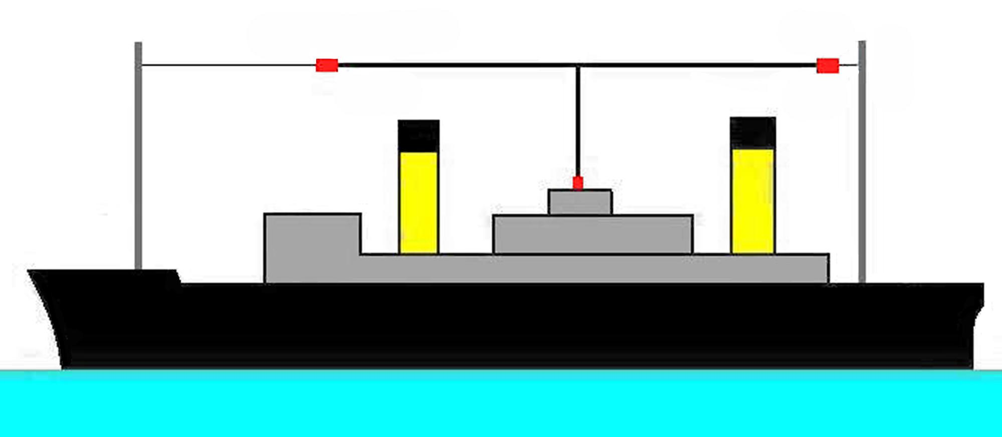 L'antenne en T soutenue entre des pylônes par des isolateurs a été utilisée sur les bateaux. L'antenne en T a été inventé au cours des premières décennies de la radiotélégraphie et trouve une application sur les petits navires pour les premières bandes radiotélégraphiques: 1800 mètres postes maritimes intercontinentaux pour l'échange des correspondances avec les navires en mer. (166,66 kHz) 600 mètres Longueur d'onde de détresse et d'appel en radiotélégraphie (500 kHz) 450 mètres longueur d'onde de radiogoniométrie (positions des navires, des ballons dirigeables, des aéronefs) (666,66 kHz) 300 mètres longueur d'onde d'appel des petits bateaux en radiotélégraphie par ondes amorties (1000 kHz) (166,66 kHz est transférée sur 143 kHz par la Convention radiotélégraphique de Washington de 1927).